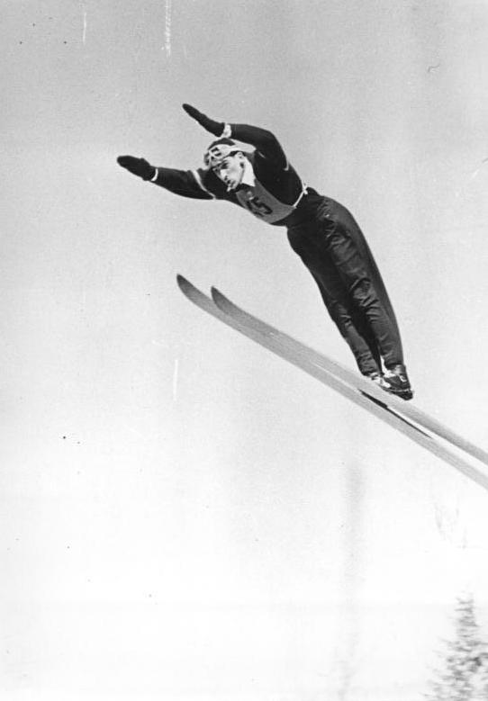 Zentralbild Wlocka 2.3.1954 V. Wintersport-Meisterschaften der Deutschen Demokratischen Republik vom 25. - 28.2.1954 in Oberhof Diesen Wintersportmeisterschaften kommt durch die Teilnahme von Sportlern aus Frankreich, der Volksrepublik Polen, der Ungarischen Volksrepublik und Westdeutschland besondere Bedeutung zu. Der Höhepunkt der V. Wintersportmeisterschaften war der Spezialsprunglauf mit internationaler Besetzung auf der Thüringenschanze am 28.2.1954. Unter den zahlreichen Ehrengästen befand sich auch der Präsident der Volkskammer der Deutschen Demokratischen Republik Dr. h.c. Johannes Dieckmann. UBz: Sepp Schiffner von der Ski-Gilde Frankfurt-M.